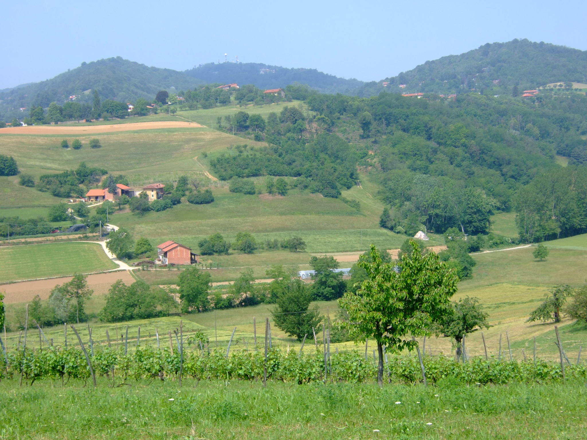 Paysage rural dans l'est de la commune (valle Canepe, sauf erreur)